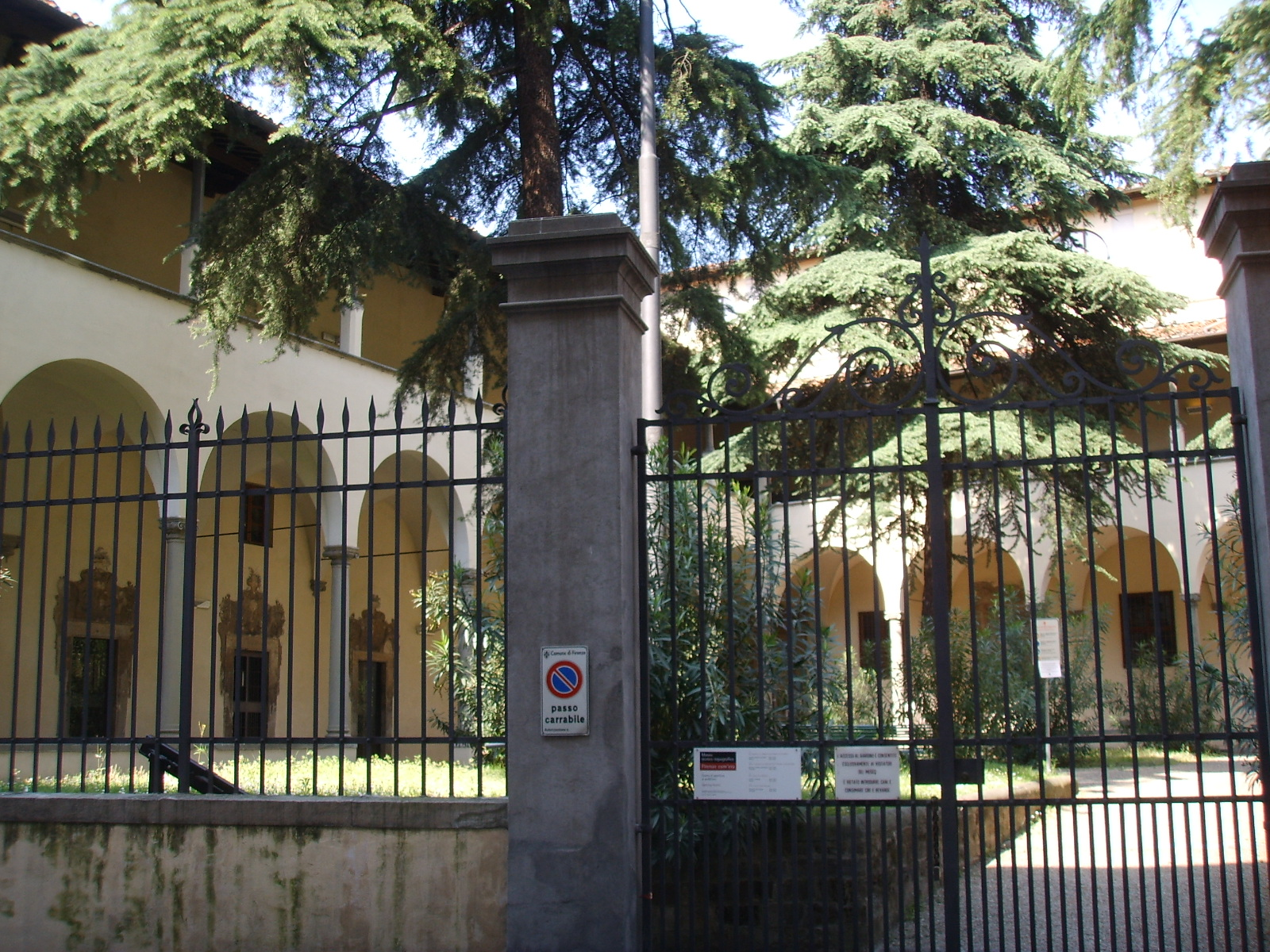 Chiostro_delle_oblate, today Museo di Firenze com'era in Florence